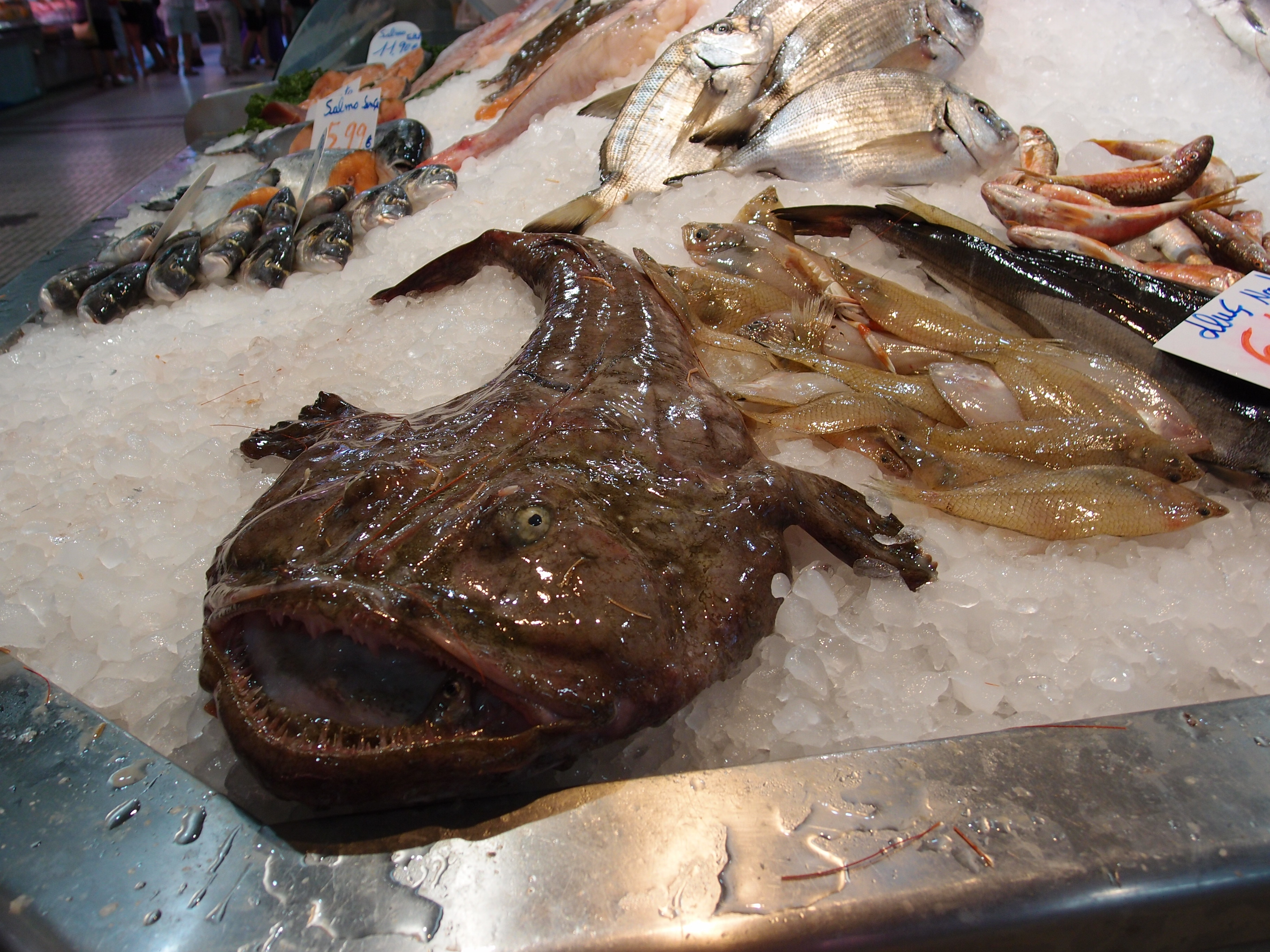 Seeteufel neben anderen Fischen in der Markthalle von Roses - Katalonien/Spanien Datum: 26.09.2011 Urheber: M. Pfeiffer alias Gordito1869 Quelle: Privates Fotoarchiv des Urhebers